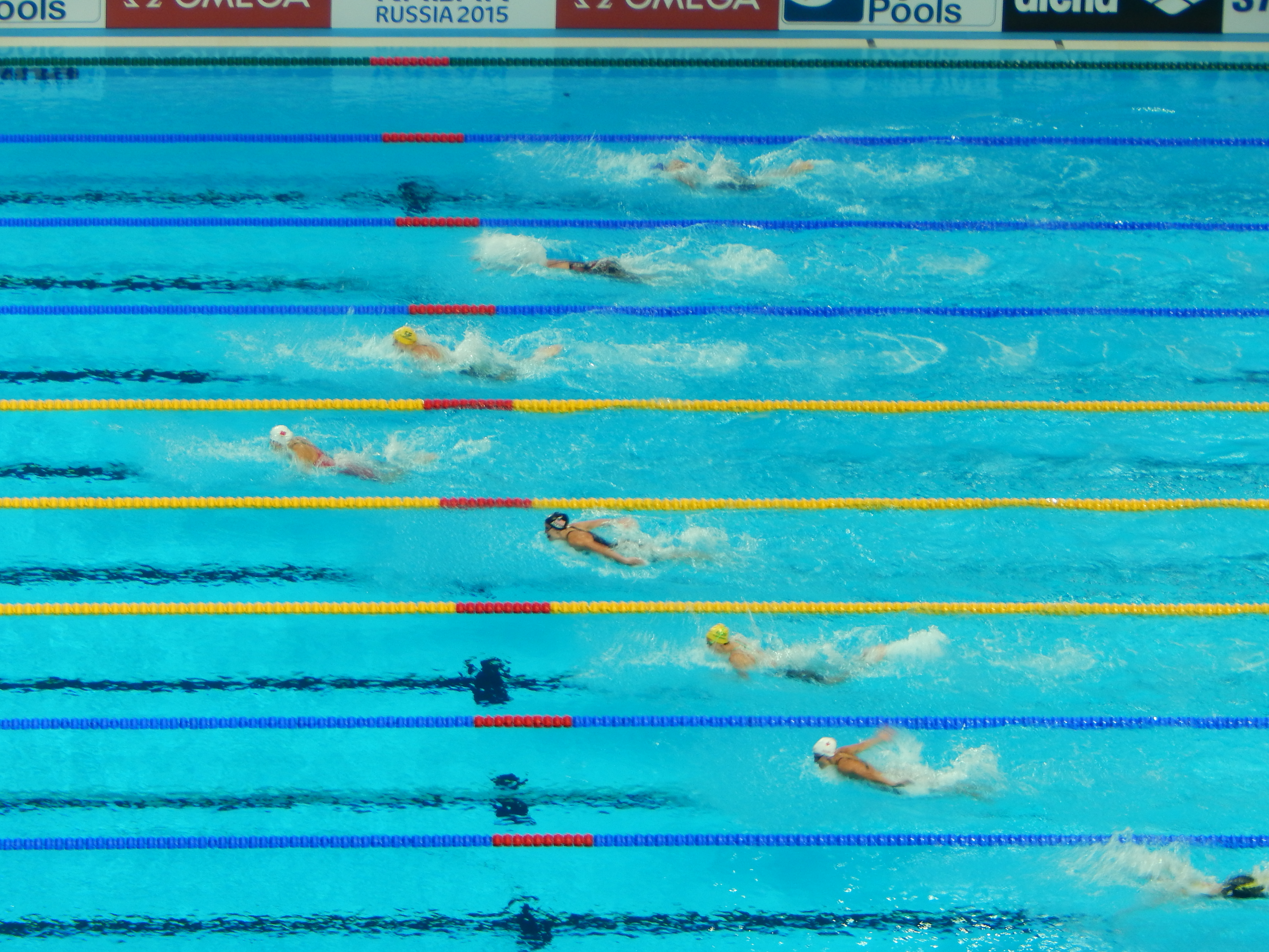 Последний финал чемпионата мира по водным видам спорта в Казани - женская комбинированная эстафета 4 по 100 метров